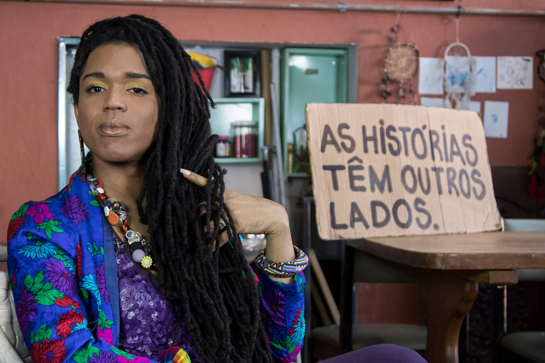 Erica Malunguinho, em 2018